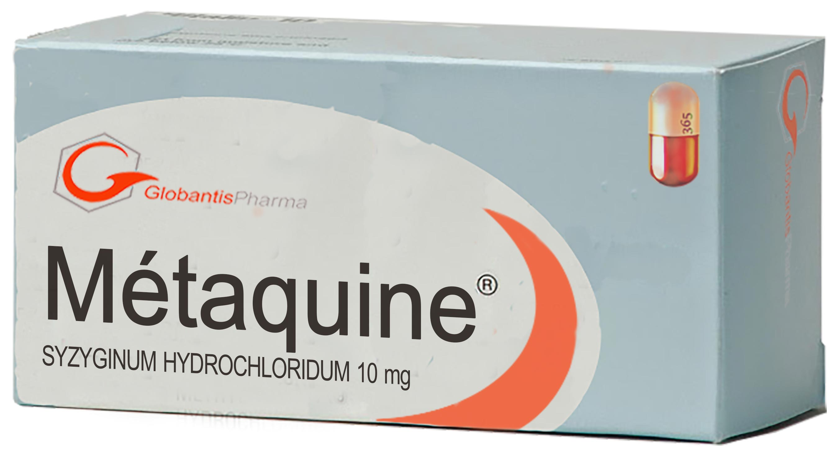 Métaquine® est un médicament psychotrope qui donne son titre à un roman de François Rouiller, paru en 2016 aux éditions l'Atalante